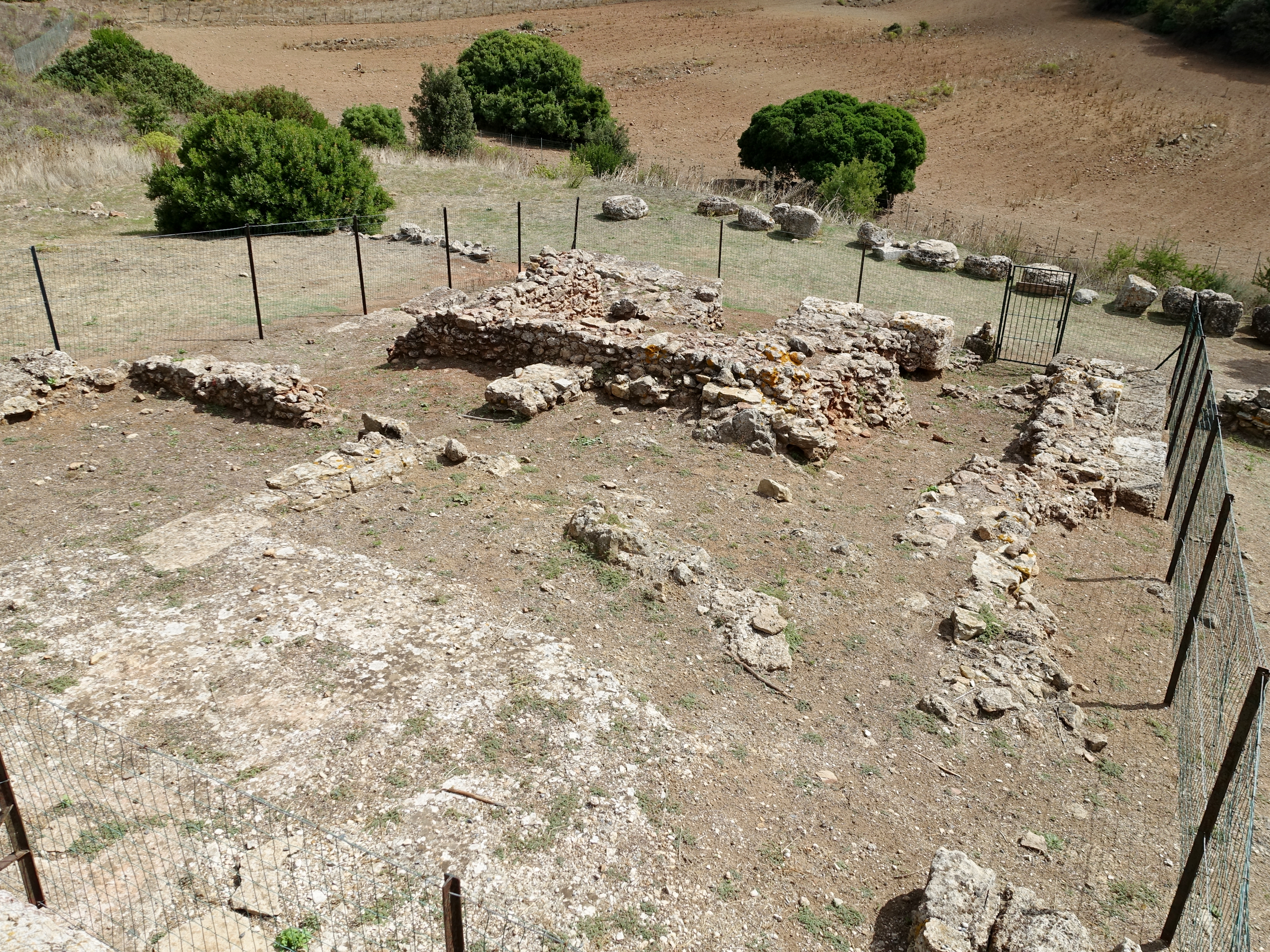 Punischer Tempel von Antas (Tempio di Antas), Gemeinde Fluminimaggiore, Sardinien, Italien